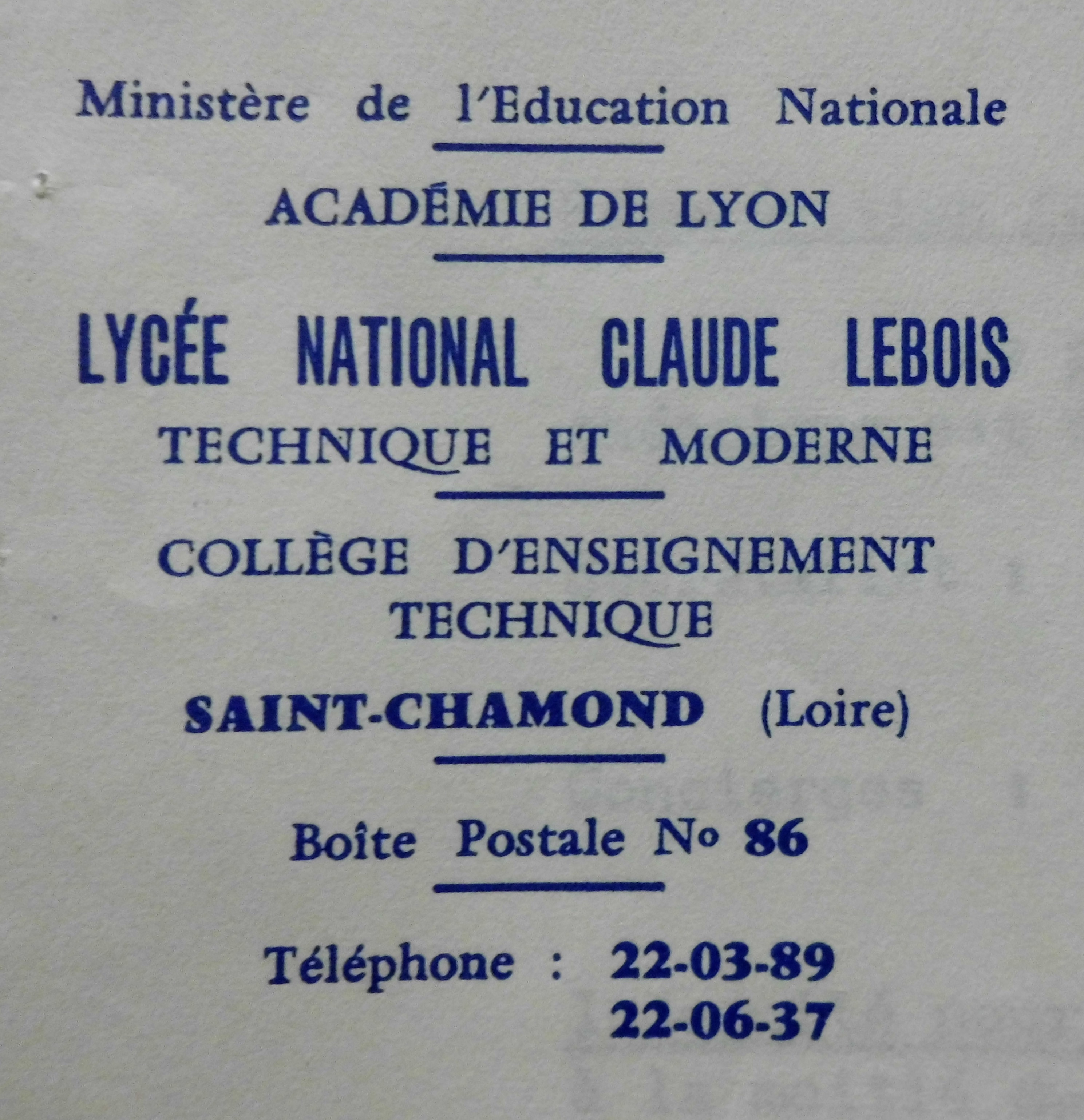 Lycée nationale Claude Lebois entête, années1960.